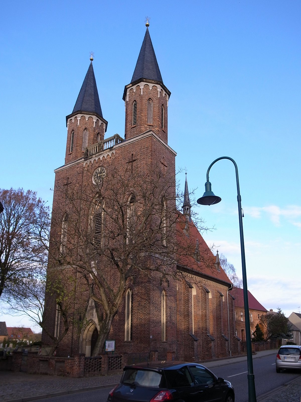 Vockerode, Kirche, erbaqut 1810-1812